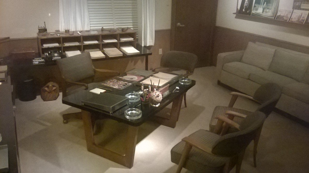 El estudio de Walt Disney , en exhibición en el parque Hollywood Studios, en la atraccion Walt Disney: One Man's Dream